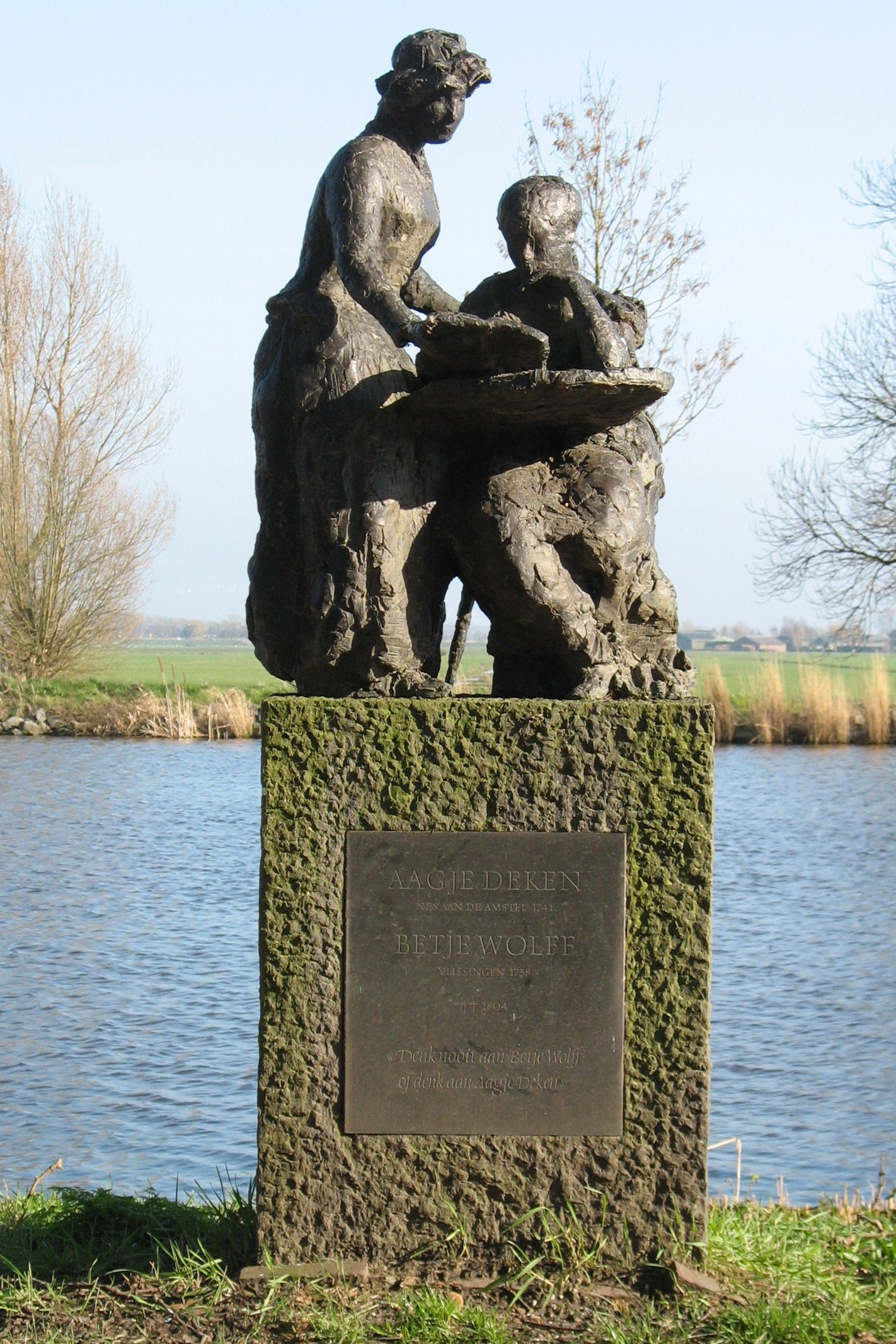 Nes aan de Amstel Betje Wolf en Aagje Deken